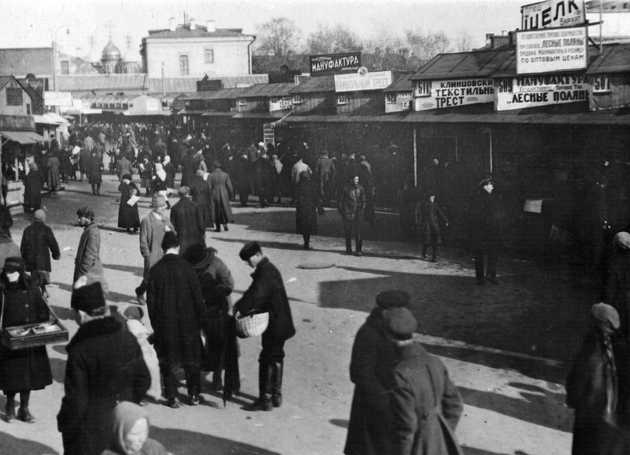 Розничная торговля на Ново-Сухаревском рынке в палатках Гострестов